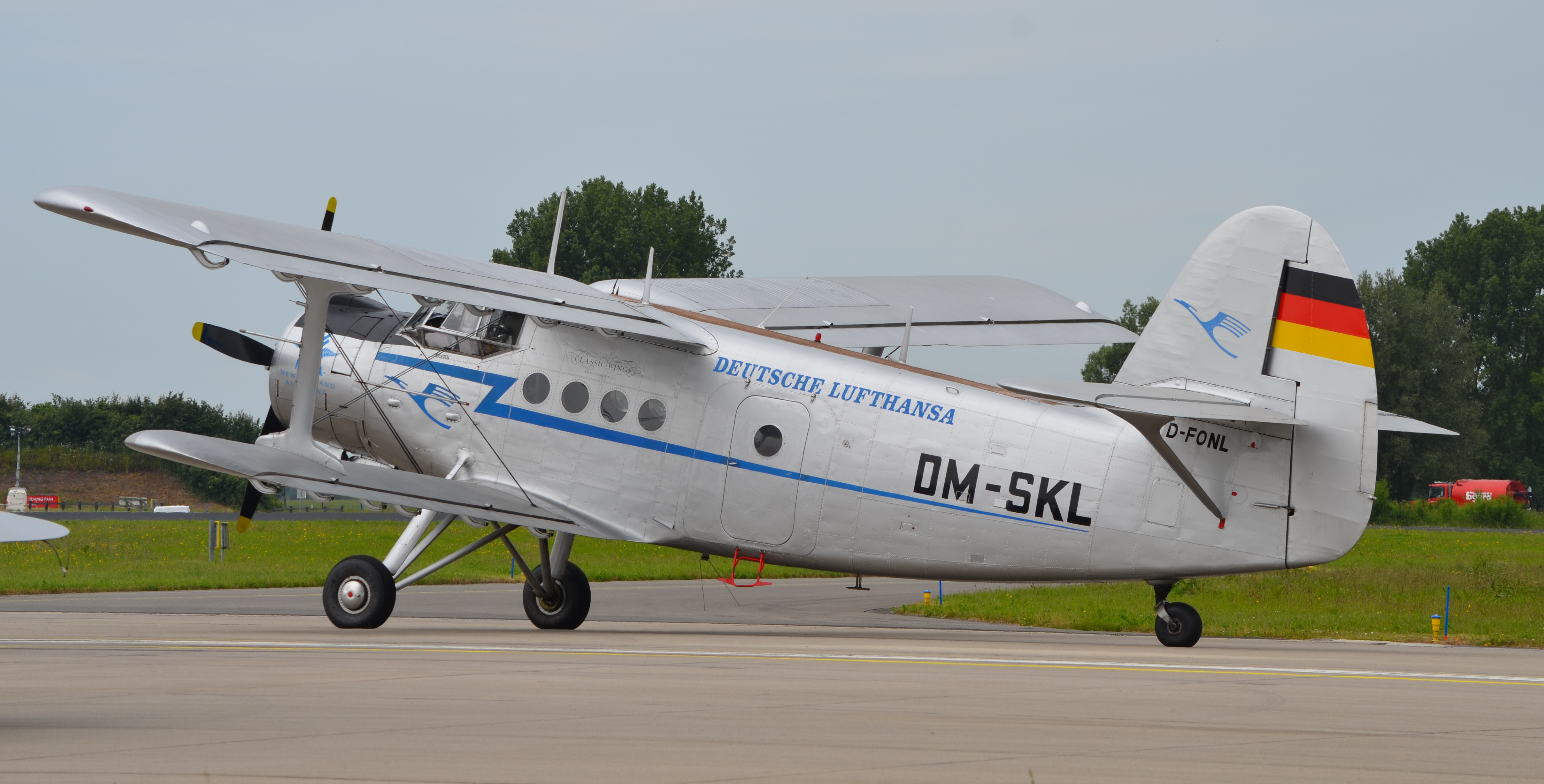 Een Antonov An-2T van Deutsche Lufthansa, DM-SKL op de vliegbasis Leeuwarden.